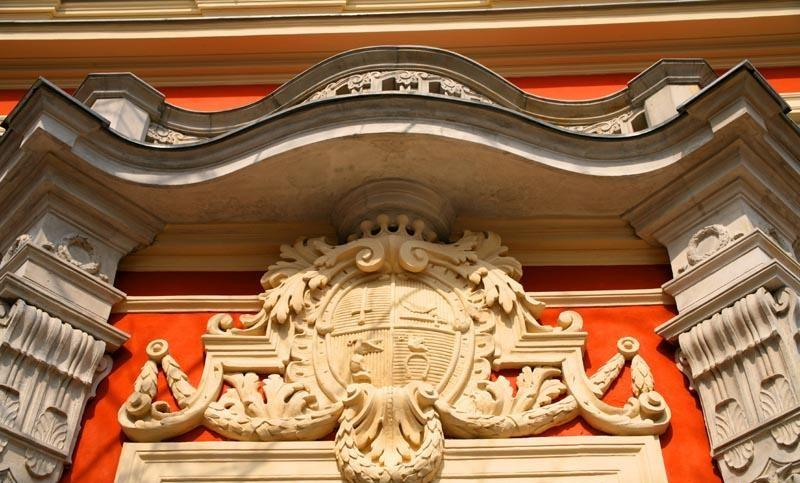 Herb Krasiński (Ślepowron odmiana Korwin-Krasiński). Warszawa (Polska)